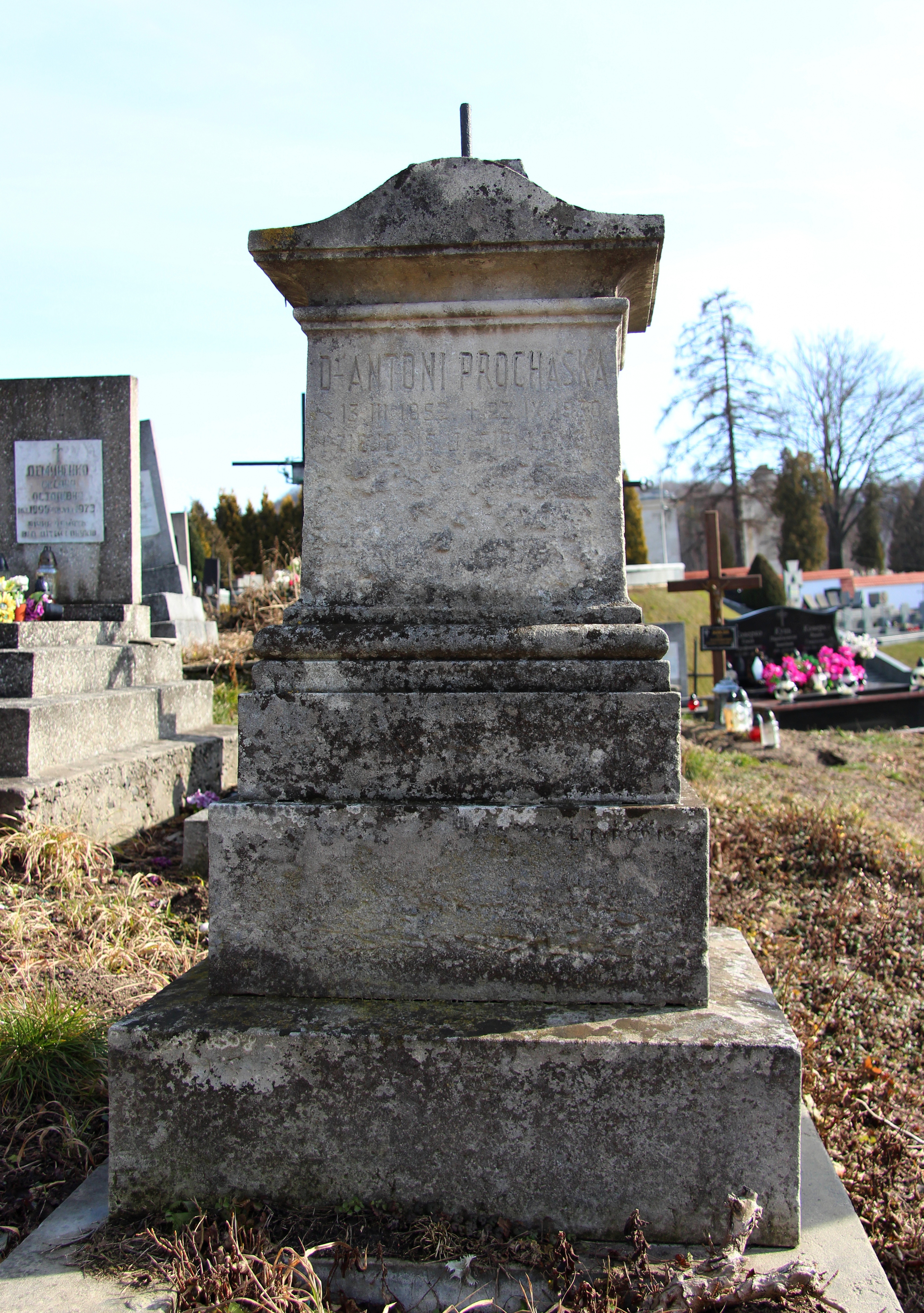 Пам'ятник на могилі А. Прохаски. Личаківський цвинтар , поле № 76.